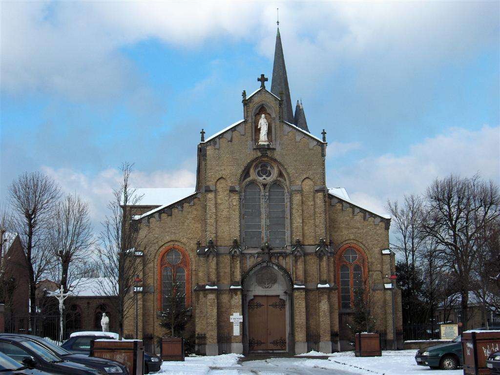 Église Saint Benoît (Saint-Pol-sur-Mer - Nord)